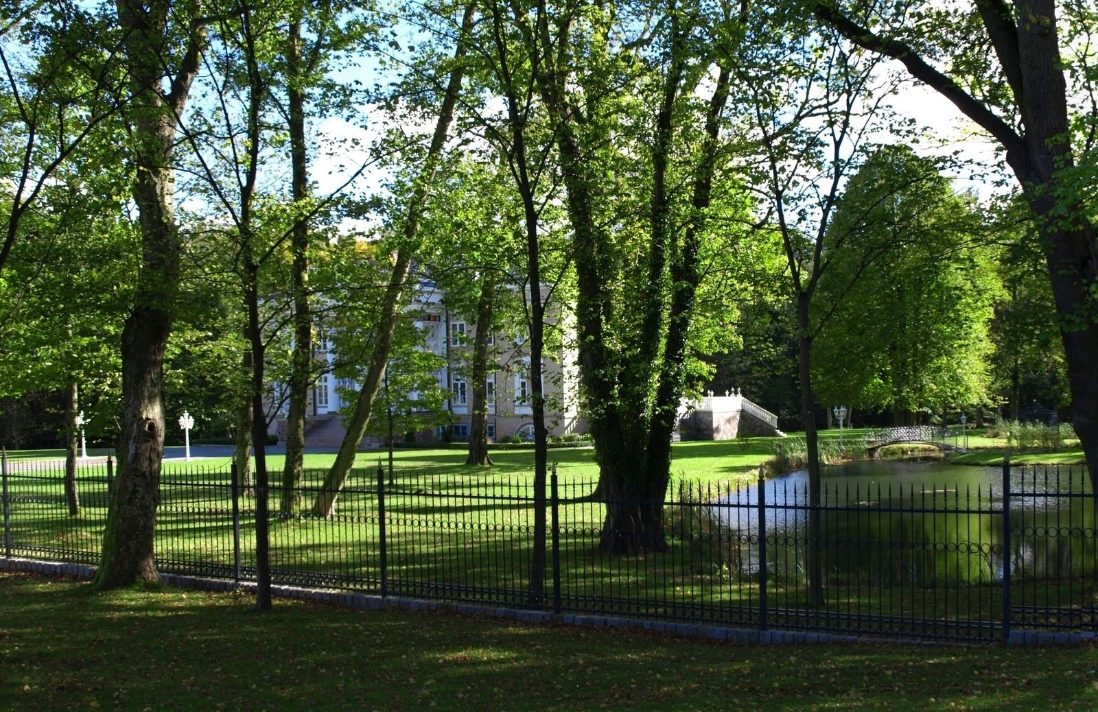 Parkanlage Herrenhaus Tüschow